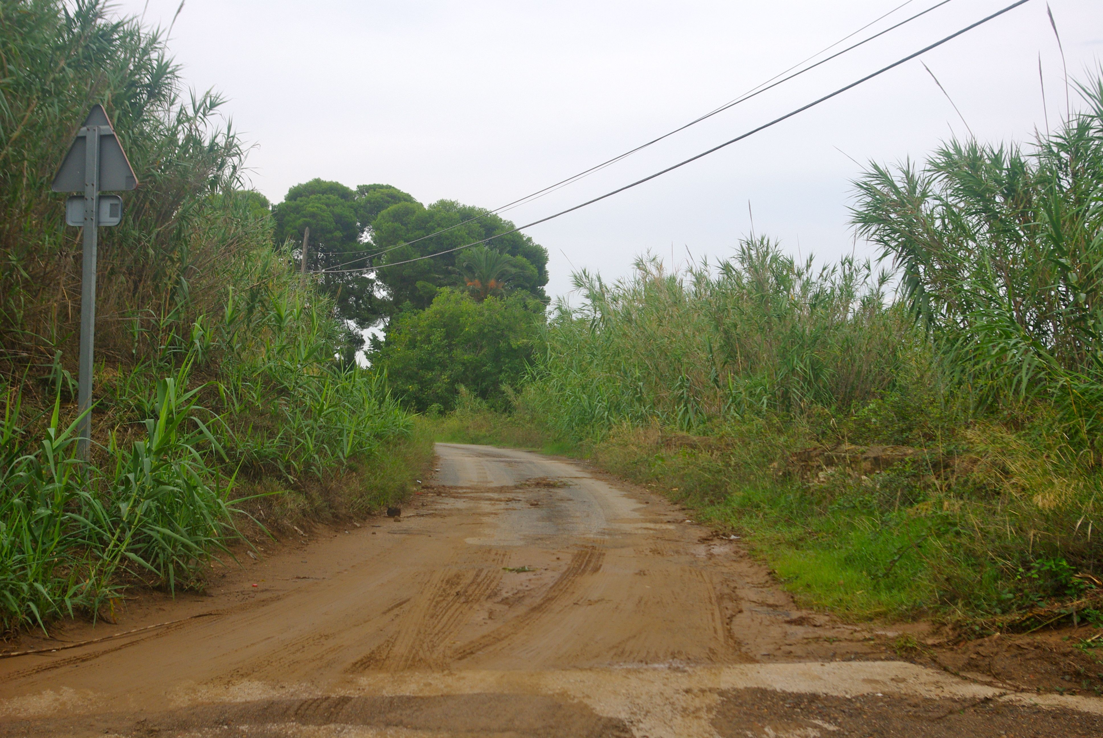 Camí del Mas de la Sena en el seu inici, al terme de Reus